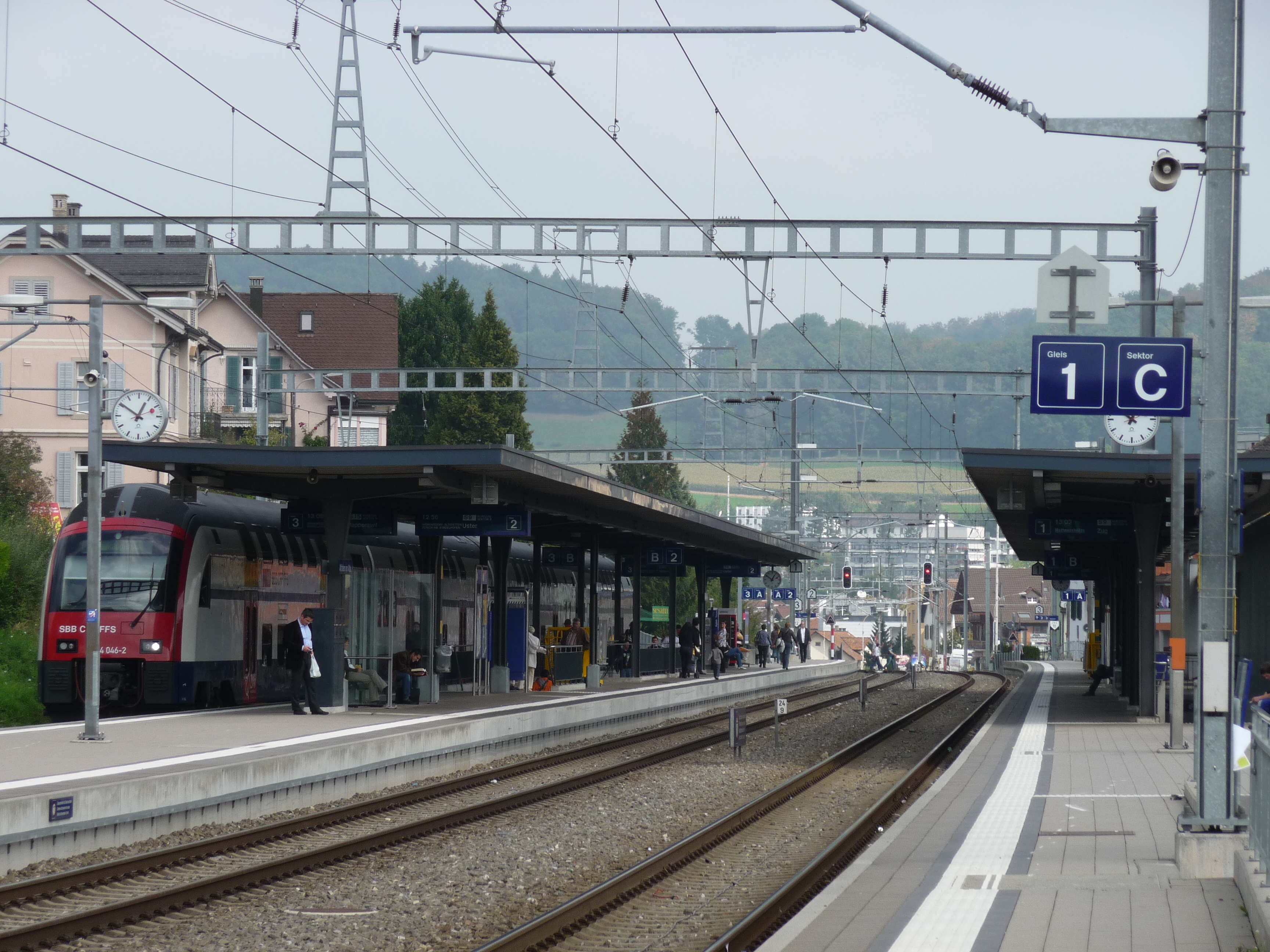 Bahnhof von Affoltern am Albis.